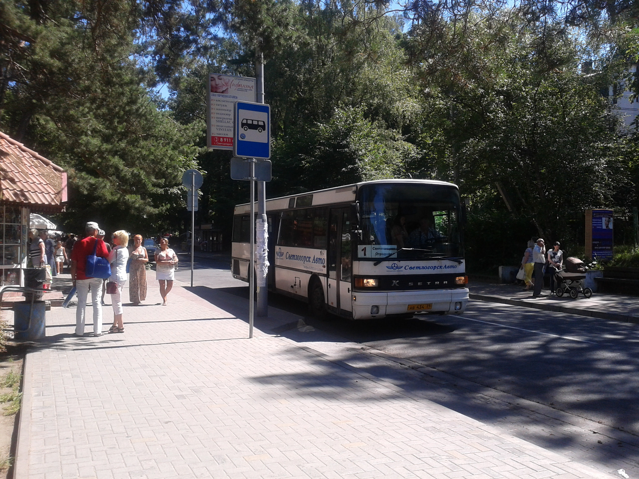 Автобусная остановка в Светлогорске, около вокзала станции «Светлогорск-2».